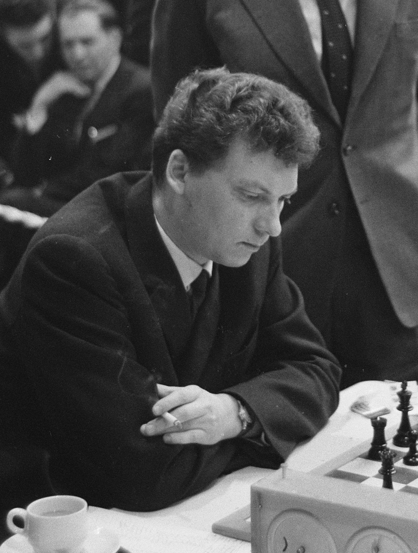 Karl Robatsch